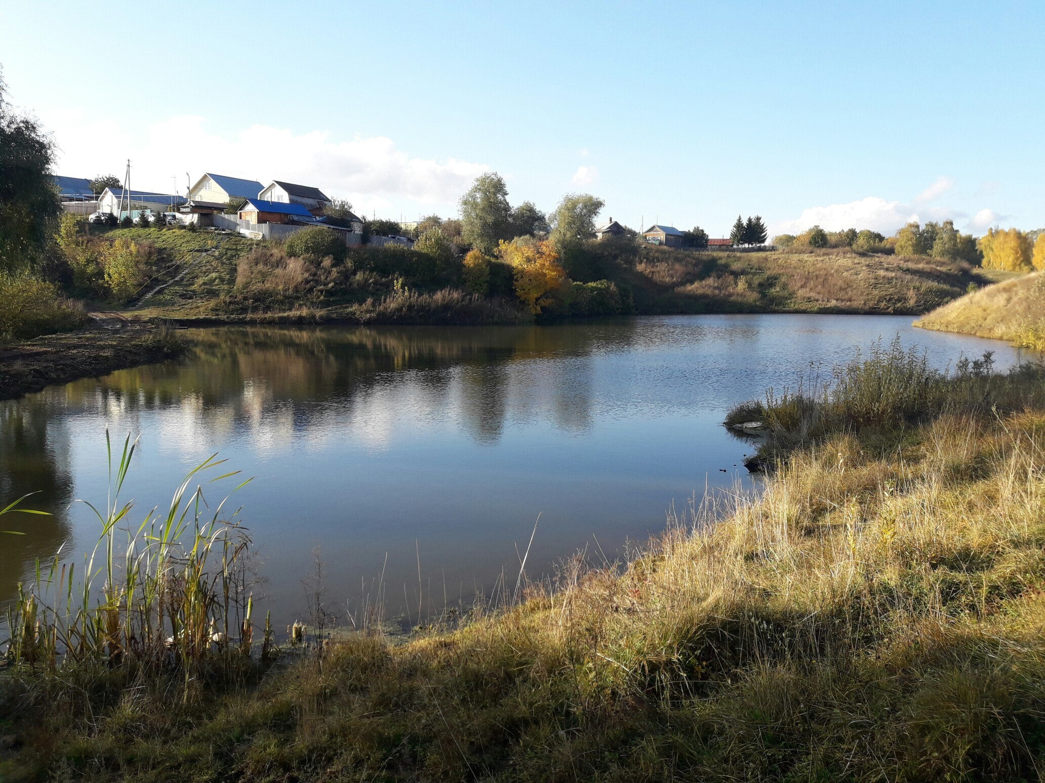 Россия, Республика Татарстан, Высокогорский район, с.Инся